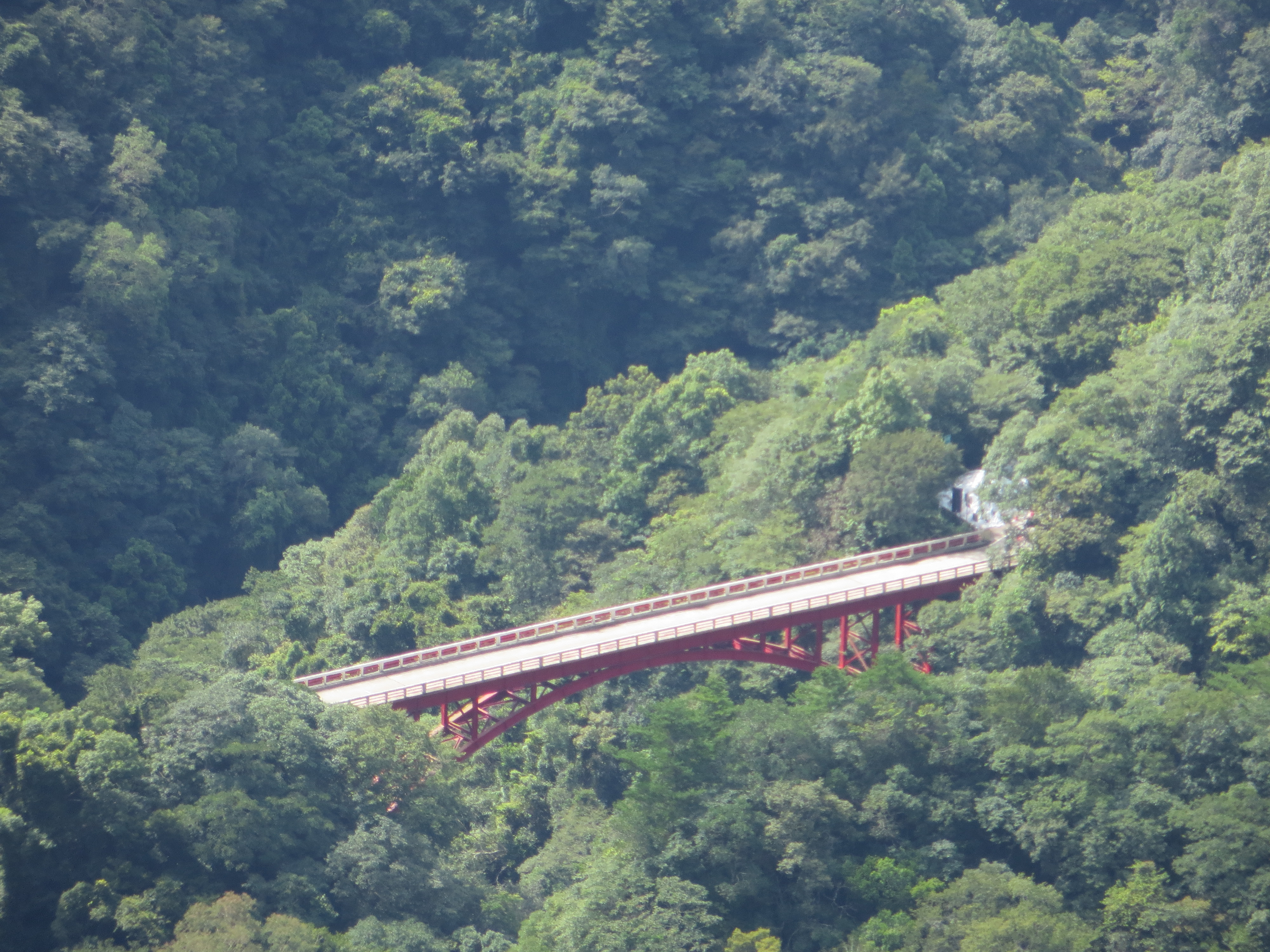 中文（台灣）: 2014年08月13日，自上巴陵觀景台遠眺北橫大曼橋，橋下為大曼溪谷。左側橋頭通往明池、宜蘭，右側通往下巴陵、桃園。